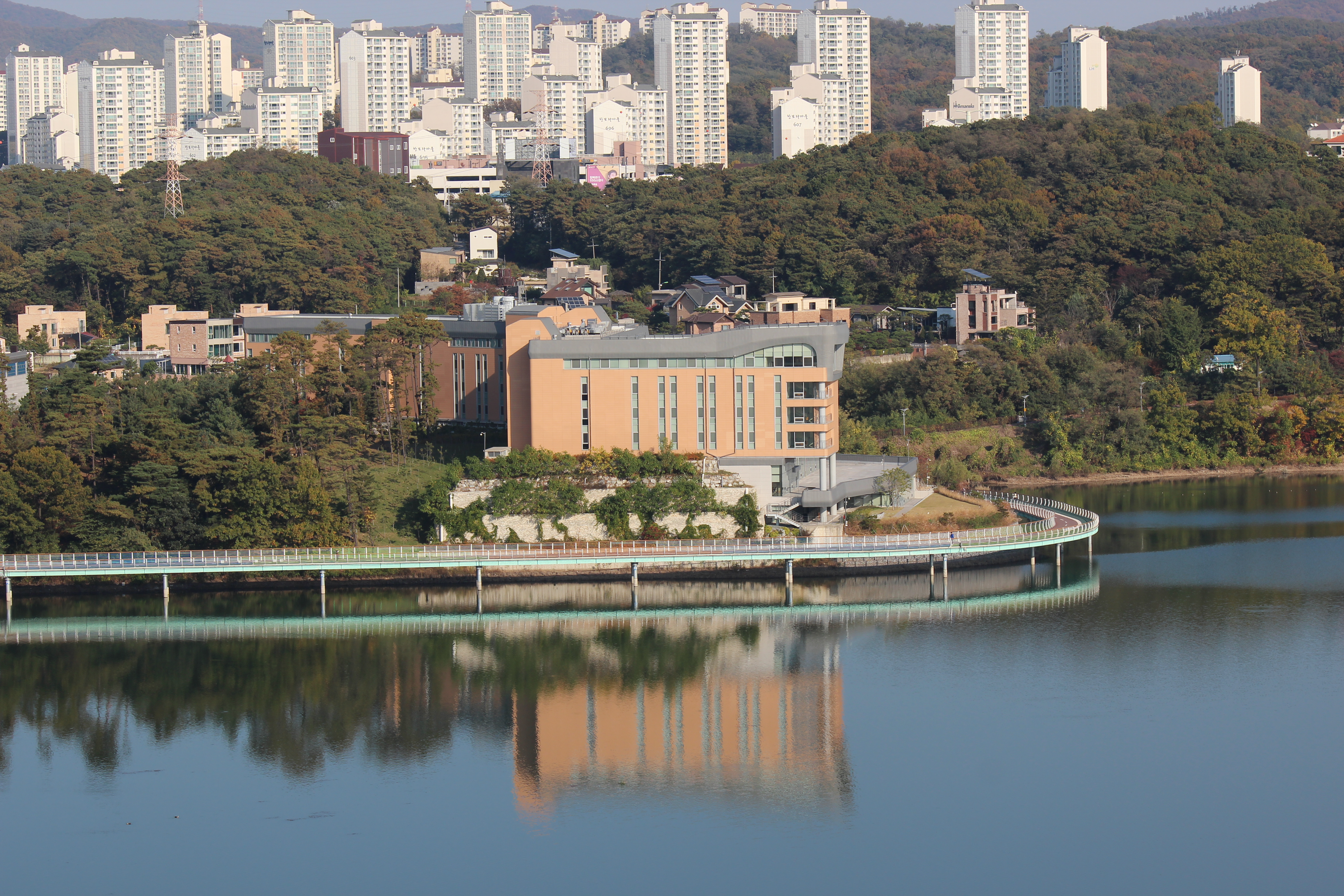 기흥호수 근처 산위에 있는 아파트들